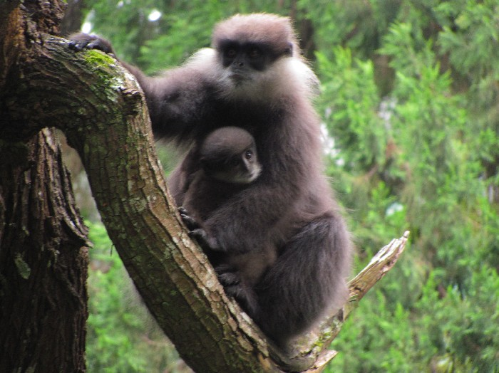 Weißbartlangur (Semnopithecus vetulus monticola) in Hakgala, Sri Lanka